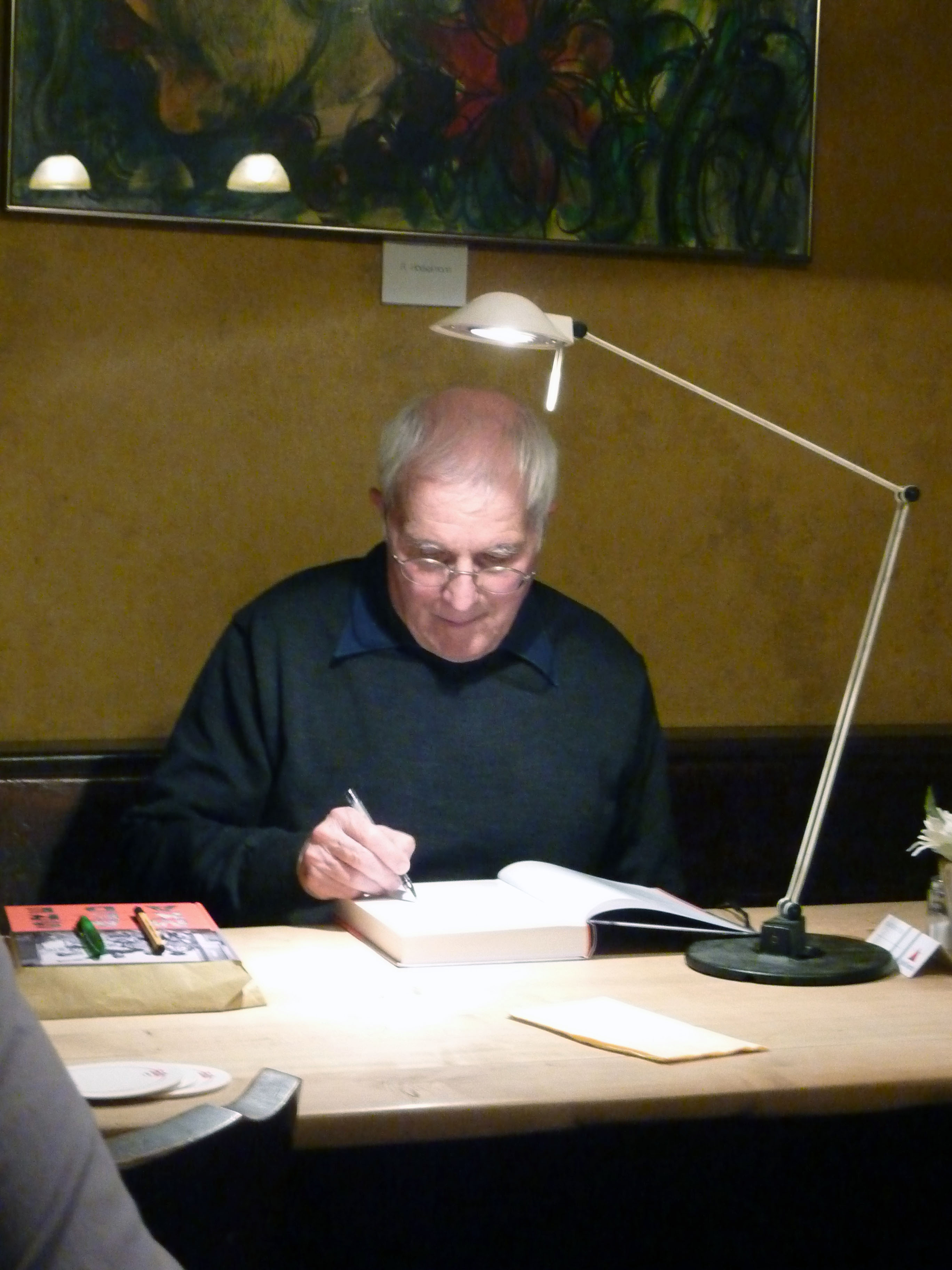 Michael Cornelius Zepter bei einer Lesung am 3. November 2012 in der Künstlerkneipe Kleine Glocke in Köln.